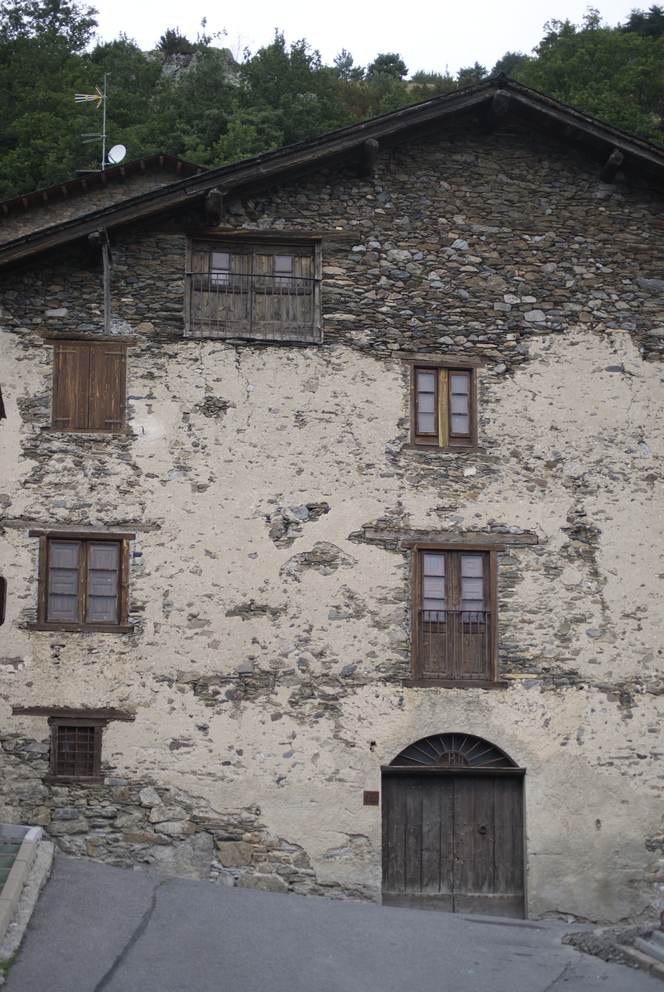 Casa Rull (La Massana)